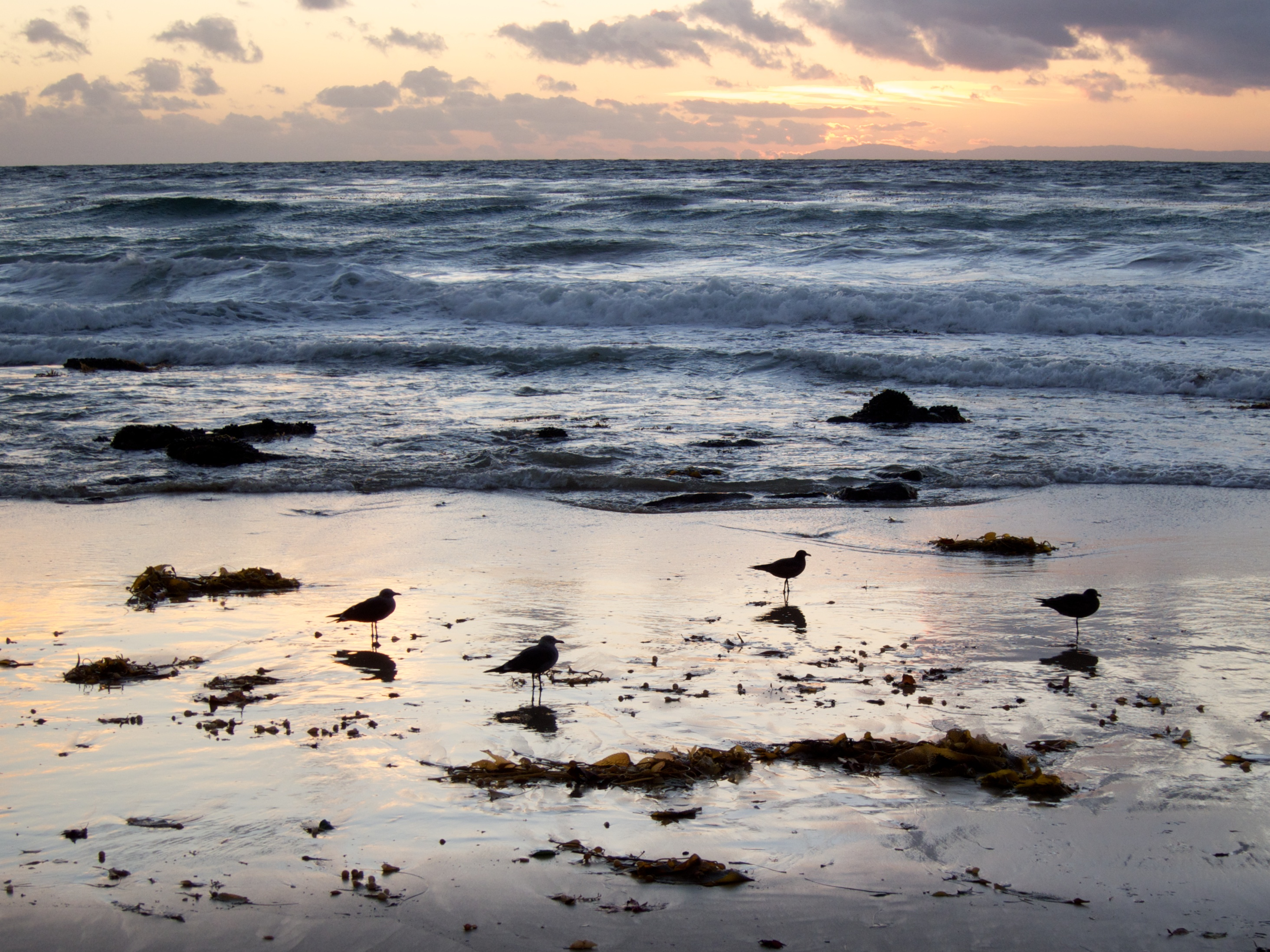 Sunset